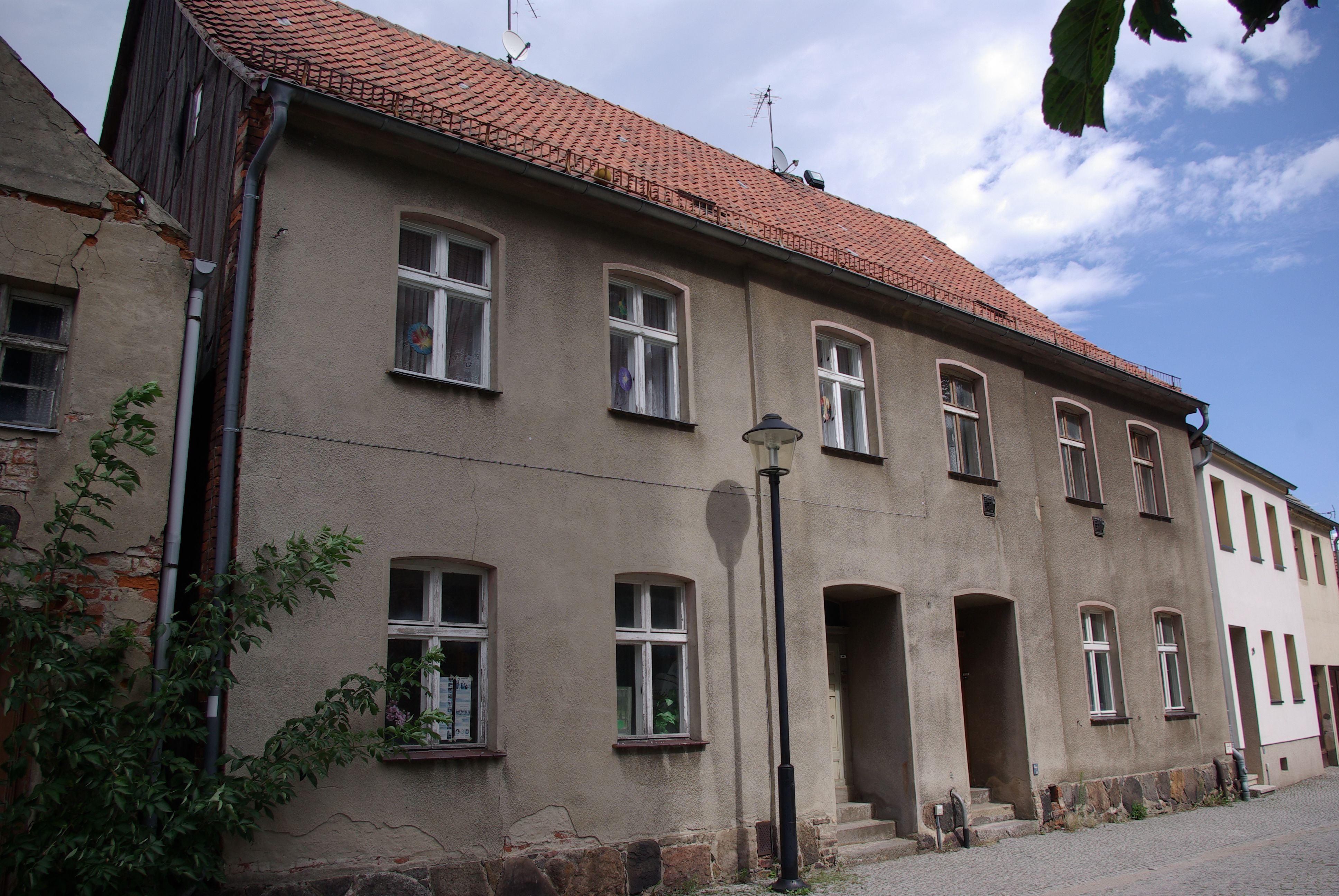 Jüterbog in Brandenburg. Das Haus in der Mittelstraße 26 / 27 steht unter Denkmalschutz. Das Haus ist das Diakonatshaus.